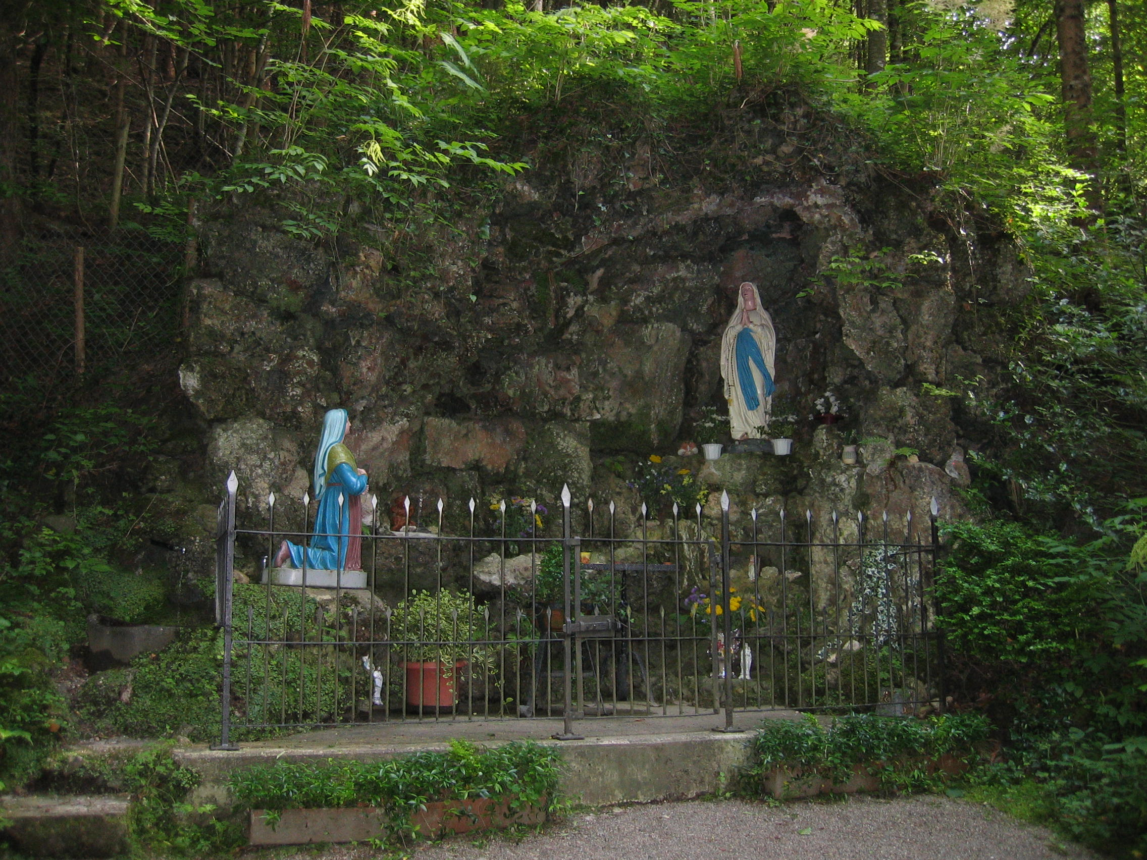 Burg Ramsberg - Lourdes-Grotte im Tobel